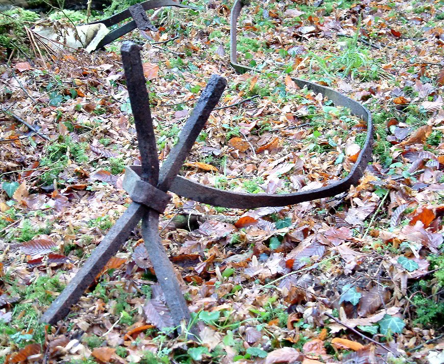 alter Maueranker mit Bandeisen